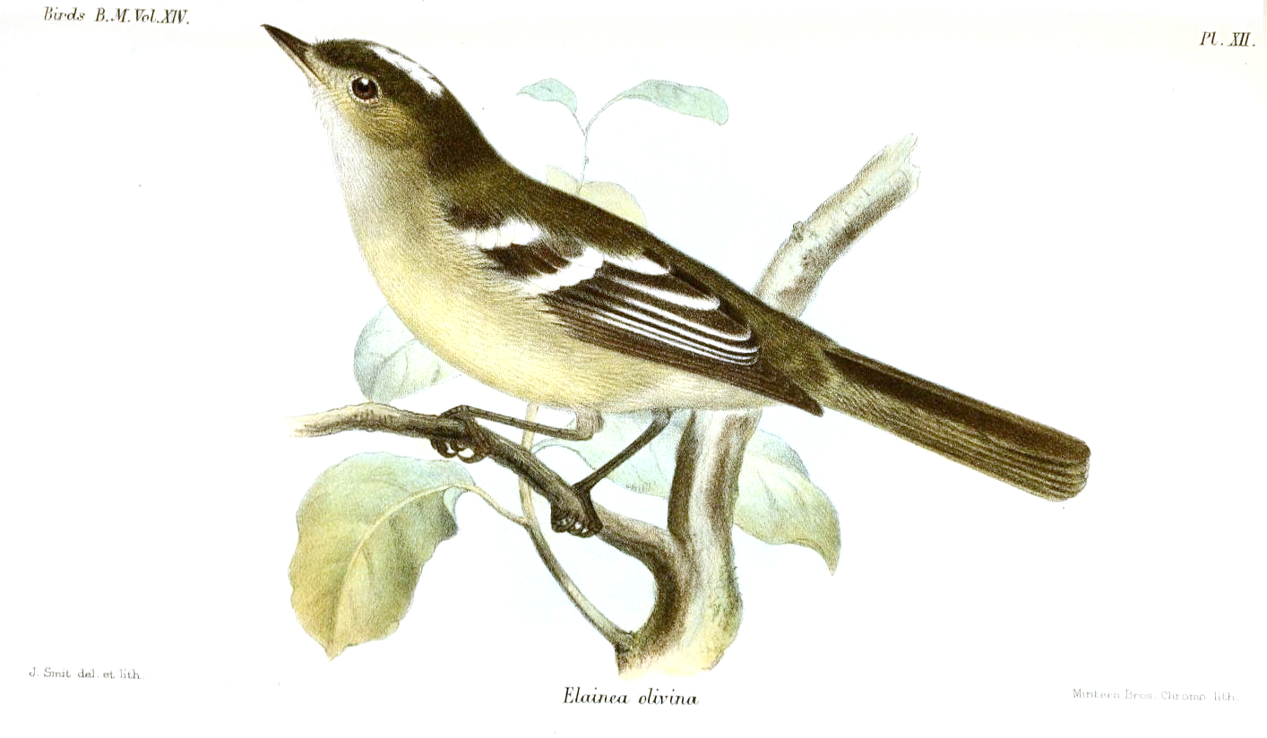 Elainea olivina = Elaenia pallatangae olivina, Sierran Elaenia ssp.: Roraima Elaenia